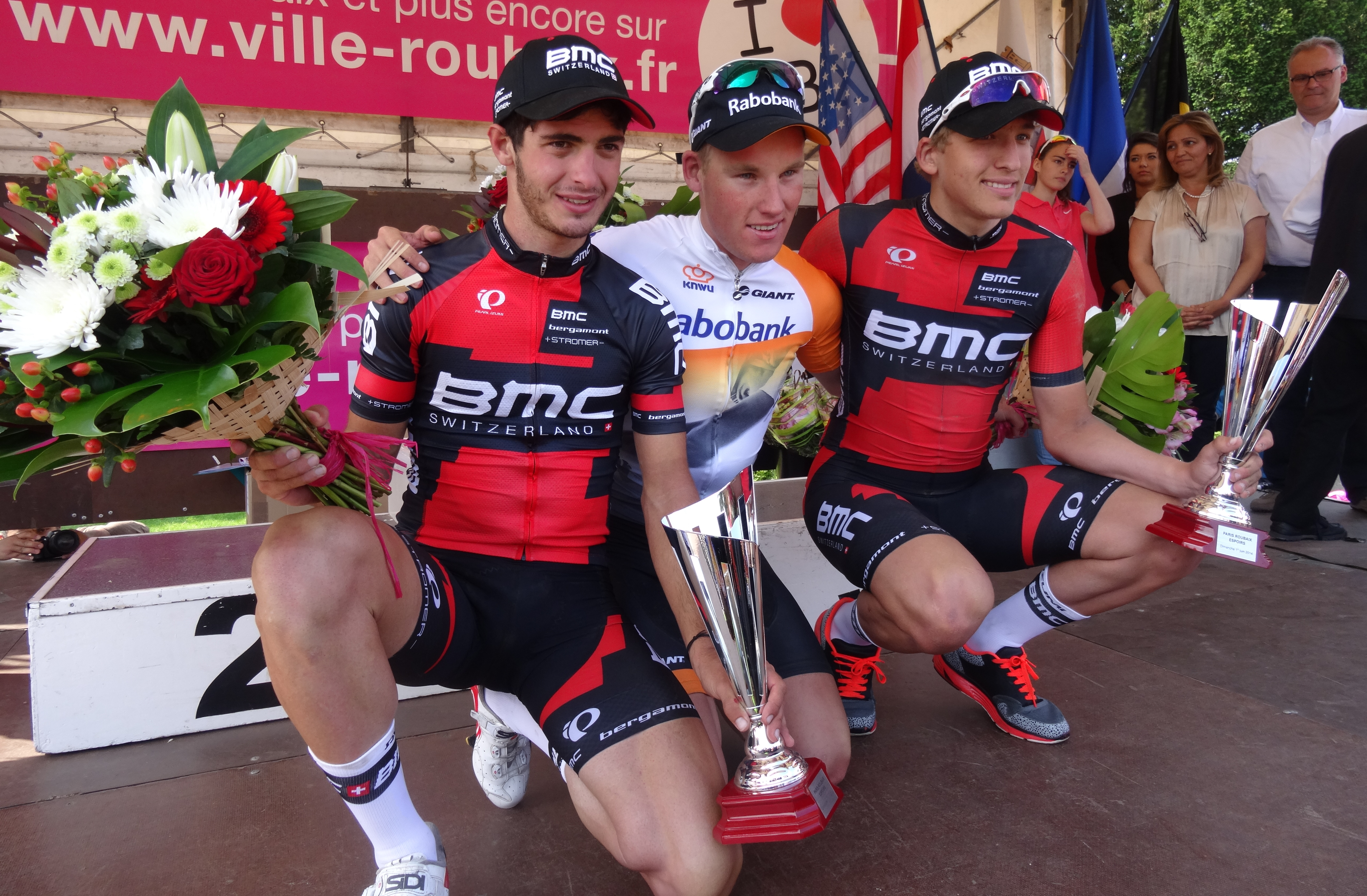 Reportage réalisé le dimanche 1er juin à l'occasion de l'arrivée du Paris-Roubaix espoirs 2014 au vélodrome André-Pétrieux à Roubaix, Nord, Nord-Pas-de-Calais, France.